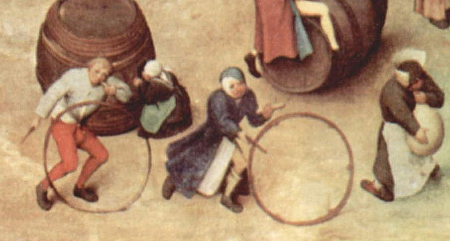 detail